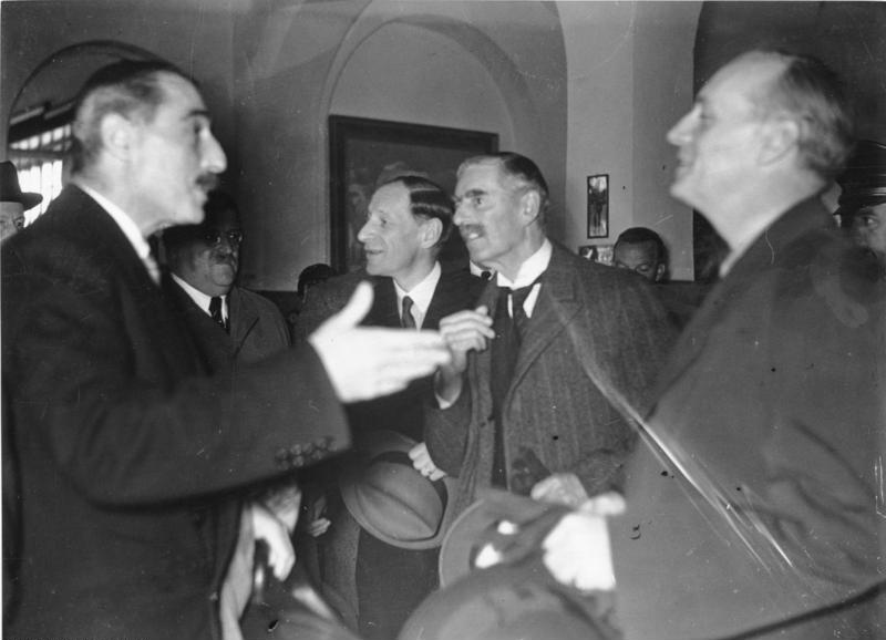 Scherl: Der Besuch des englischen Ministerpräsidenten beim Führer. Im Grand Hotel zu Berchtesgaden, wo der englische Staatsmann Wohnung genommen hatte. V.r.n.l. Reichsaussenminister v. Ribbentrop, Ministerpräsident Chamberlain, weiter links Staatsminister Meissner und der englische Botschafter in Berlin Henderson. Fot. 15.9.1938 12280-38 [II.TEXT] ADN-ZB/Archiv Vor der Unterzeichnung des Münchener Abkommens am 29.September 1938: Am 15. September erfolgte ein Gespräch zwischen dem deutschen Außenminister von Ribbentrop (r.a.) und dem britischen Premierminister Chamberlain (2.von r.) in dessen Residenz, dem Grand Hotel Berchtesgaden. Zugegen waren außerdem Staatsminister Meißner (3.von r.) und der britische Botschafter in Deutschland Henderson (l.).